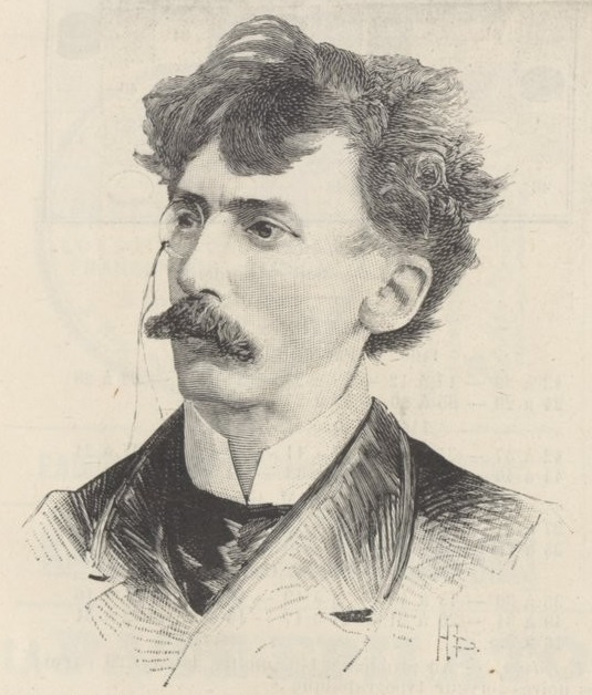 M. le docteur Lopes Trovão, directeur de l'Assistance publique de Rio